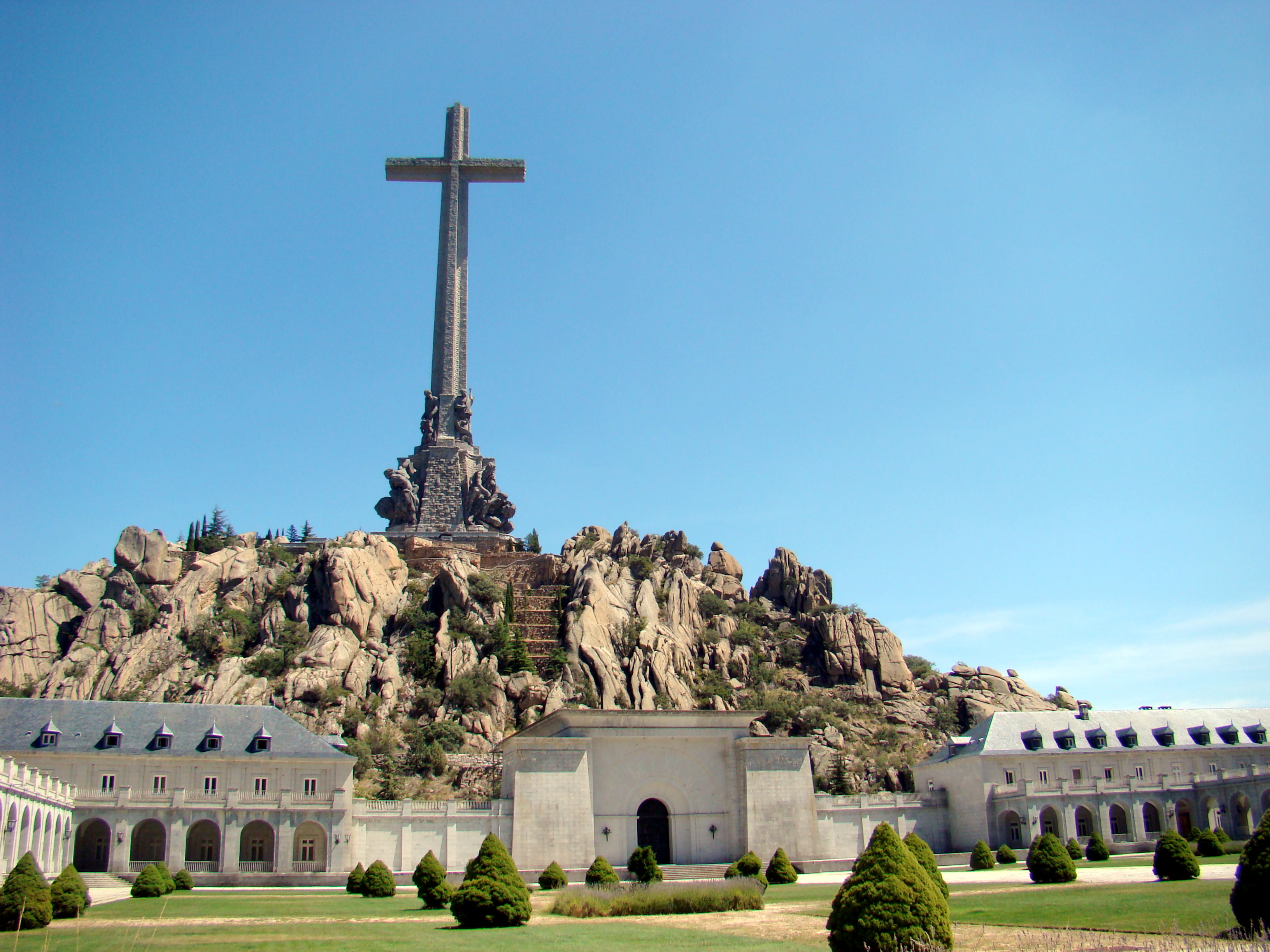 Valle de los Caídos, desde la explanada de la Abadía II